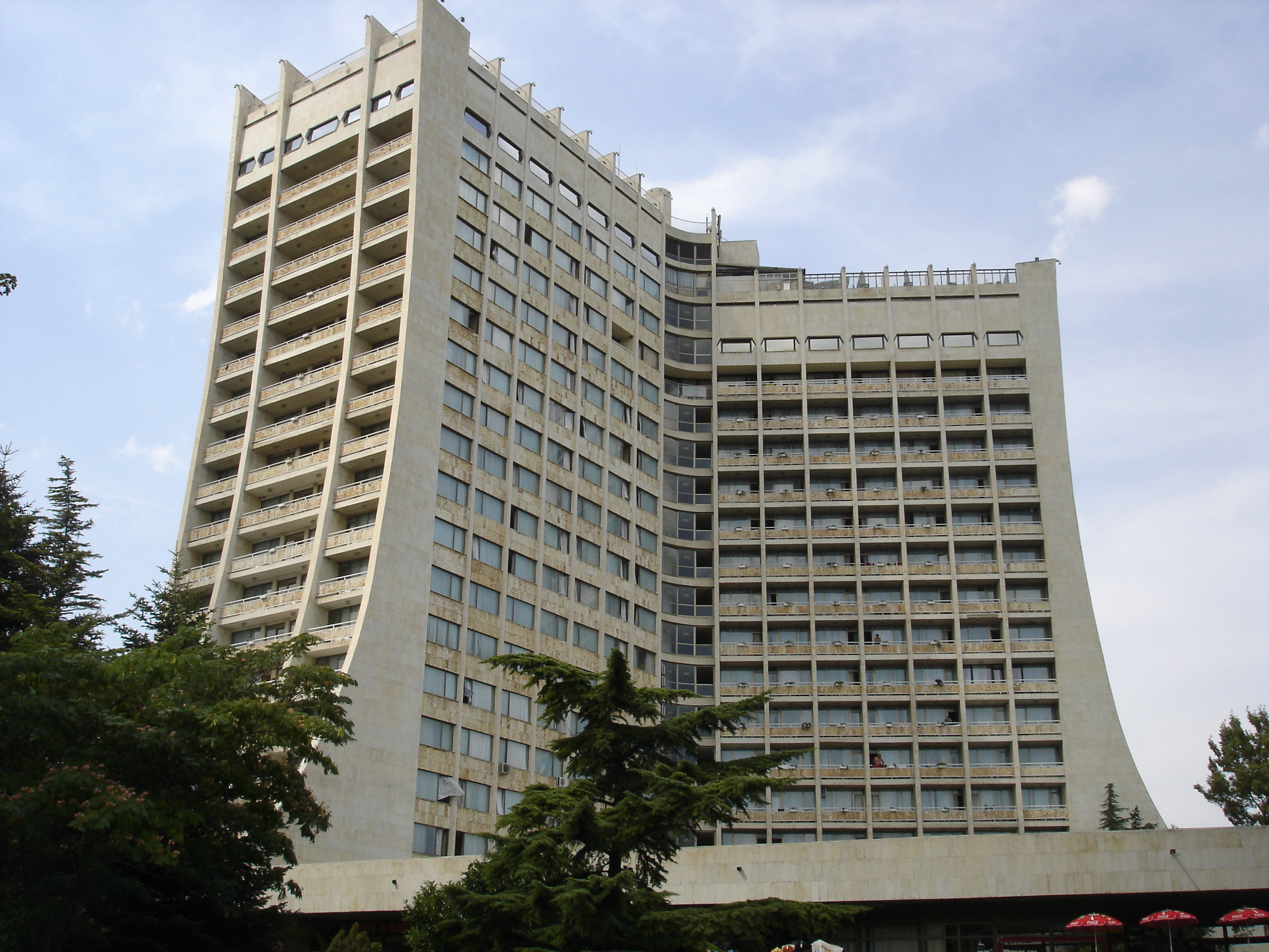 Hotel Dobrudja in Albena, Bulgaria